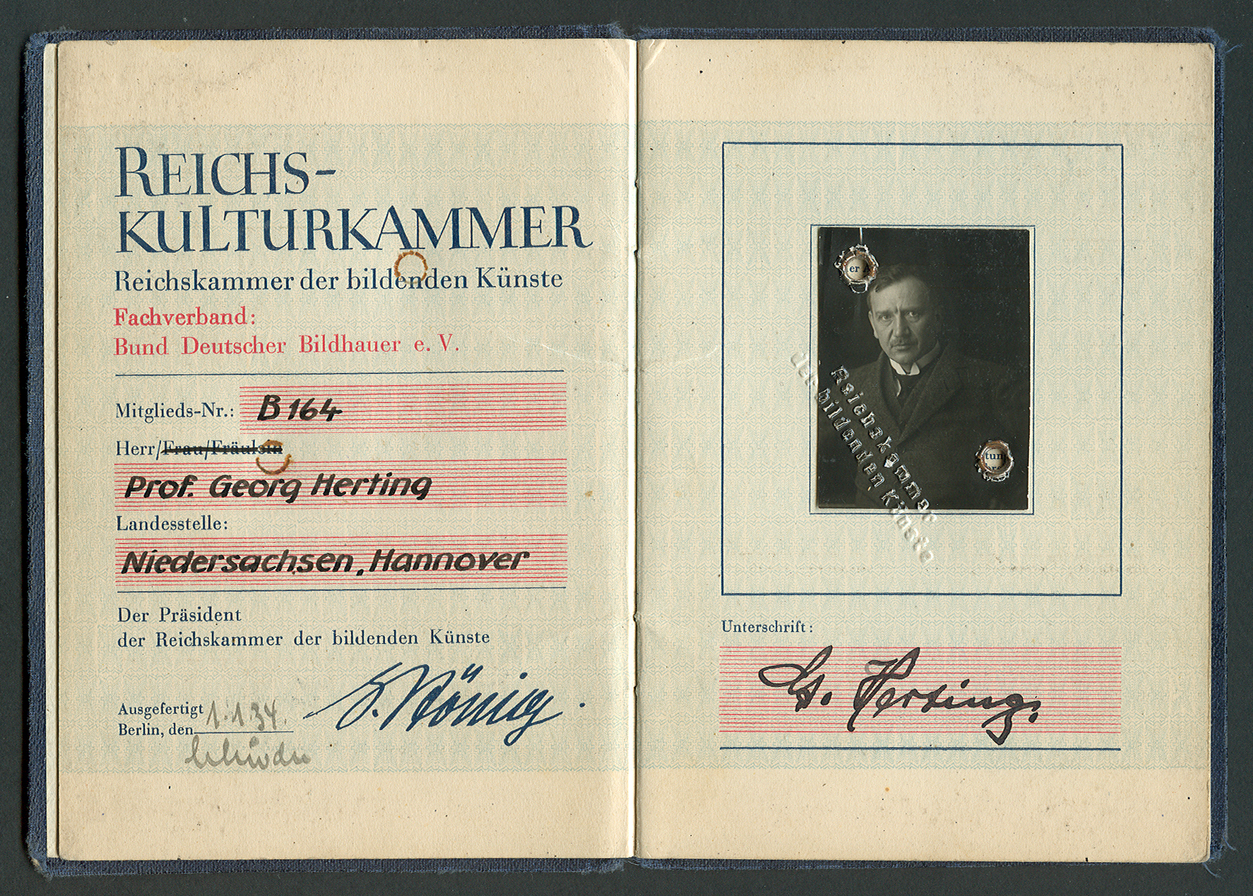 Ausweis Reichskulturkammer, Reichskammer der bildenden Künste, Fachverband Bund Deutscher Bildhauer, Mitglieds-Nr. B 164, Professor Georg Herting, Landesstelle Niedersachsen, Hannover, der Präsident der Reichskammer der bildenden Künste (Unterschrift Eugen Hönig), ausgefertigt: Berlin, 1. 1. 1934 (Seite 06 und 07, drei Unterschriften)